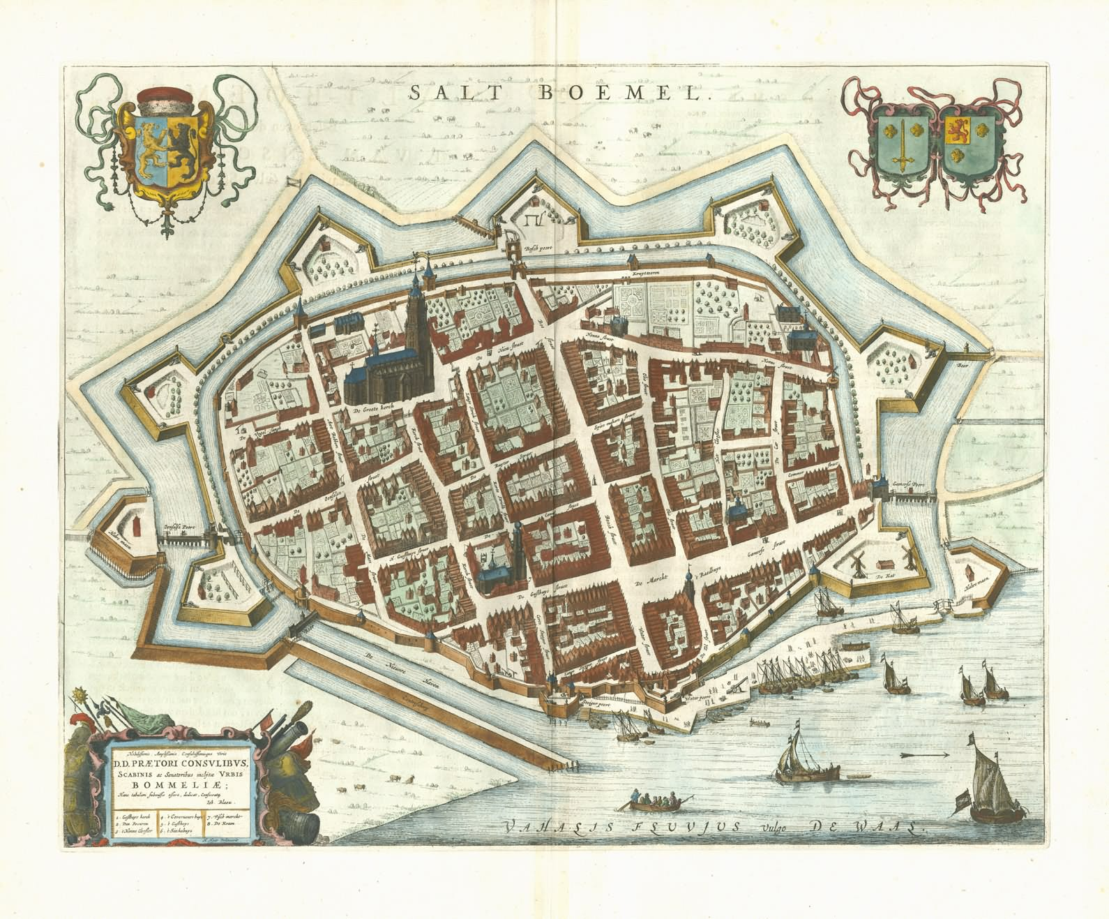 Salt Boemel (Zaltbommel), 41 x 52 cm